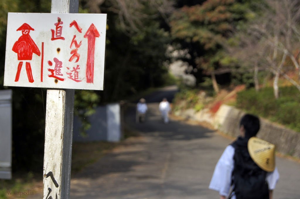 遍路のルート随所にある道しるべの一例。歩き遍路時に撮影。